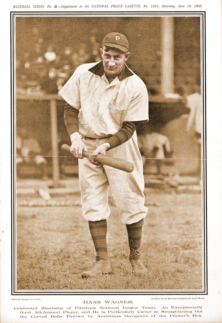 Honus Wagner